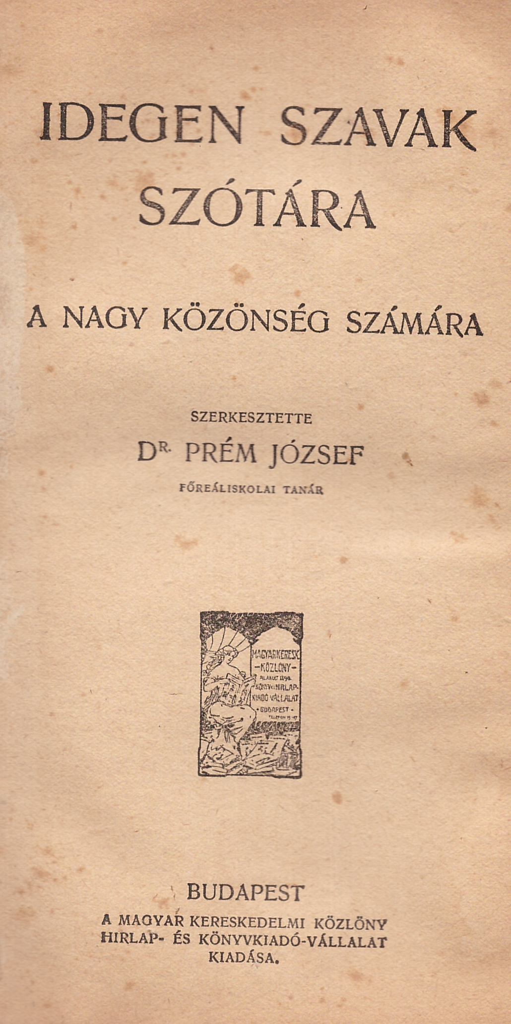 Prém József (1850-1910): Idegen szavak szótára (1909) - címlap